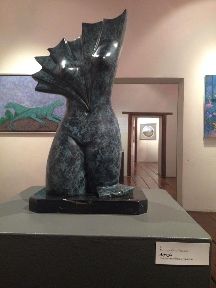 Escultura por Mercedes Ortiz Vaquero en Casa Risco, San Ángel , CDMX